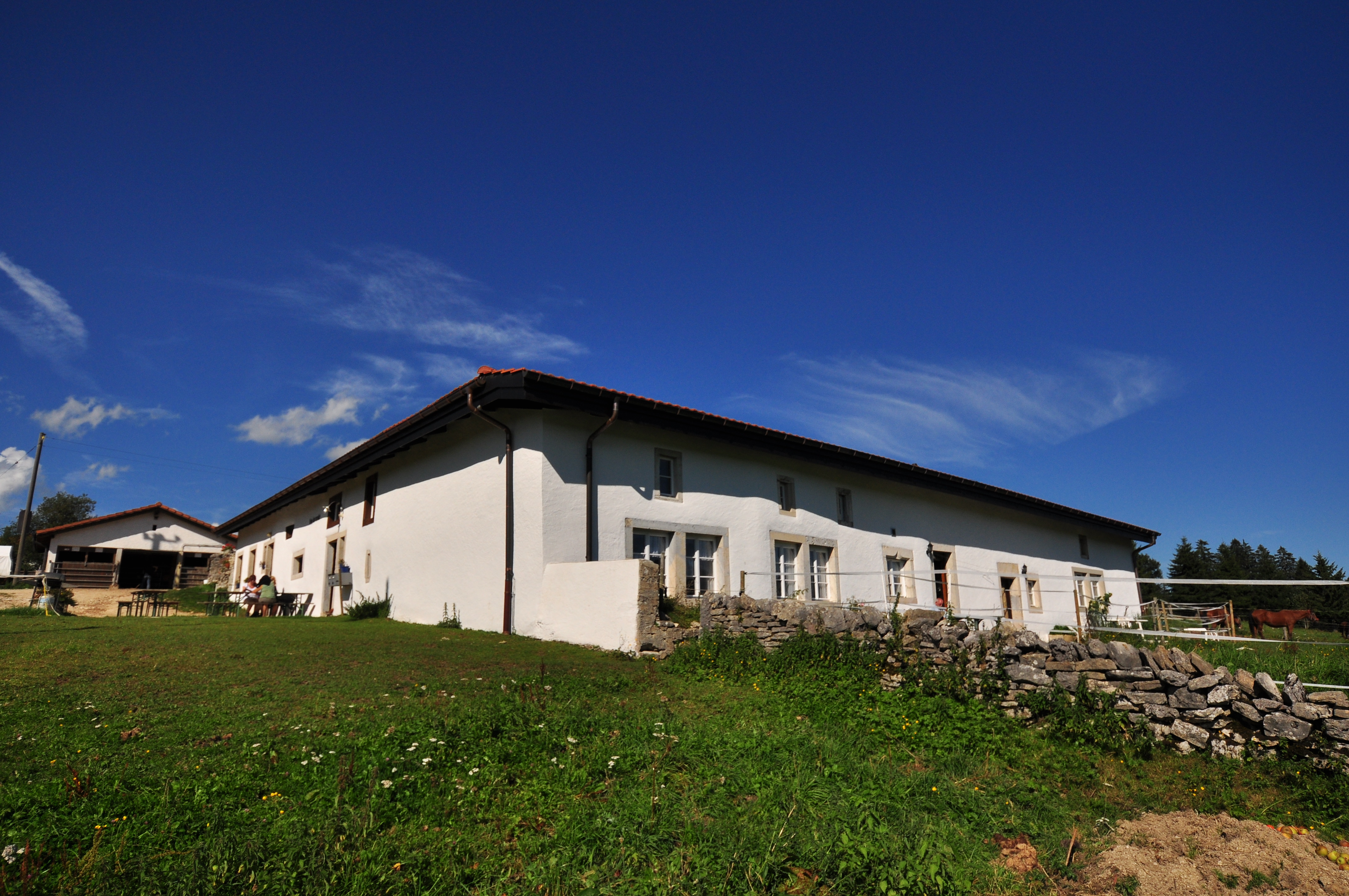 La Chaux-des-Breuleux Ferme Nr. 22